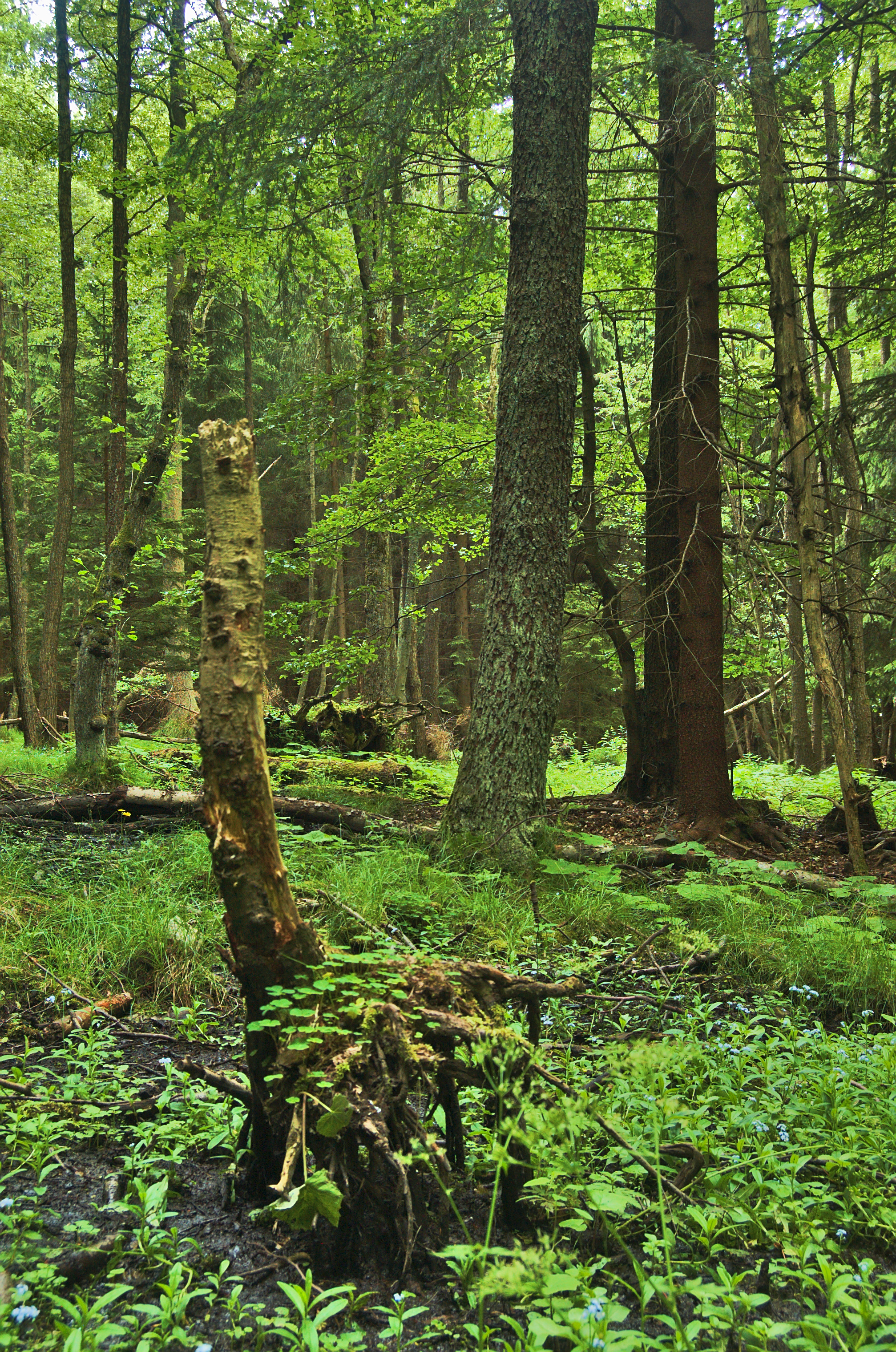 Prameniště Hamerského potoka, Buková, okres Prostějov